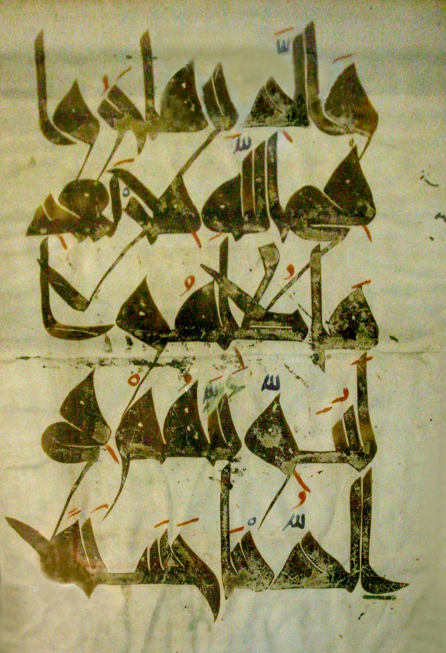 Photo perso prise en août 2007 au musée du Bardo en Tunisie d'une page calligraphiée de Coran (exemple d'art islamique).